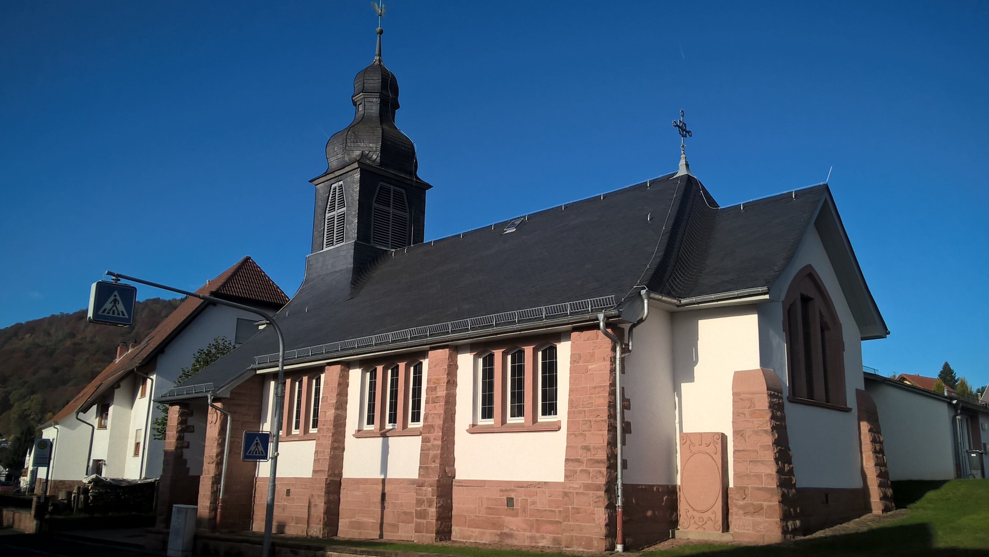 Ev. Dankeskirche in Gelnhausen-Haitz, Main-Kinzig-Kreis, Hessen, Deutschland